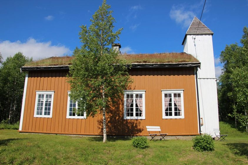 Bjørhusdal gamle skole og kapell. Foto: Odd Bakken, fra Riksantikvarens Kulturminnesøk.